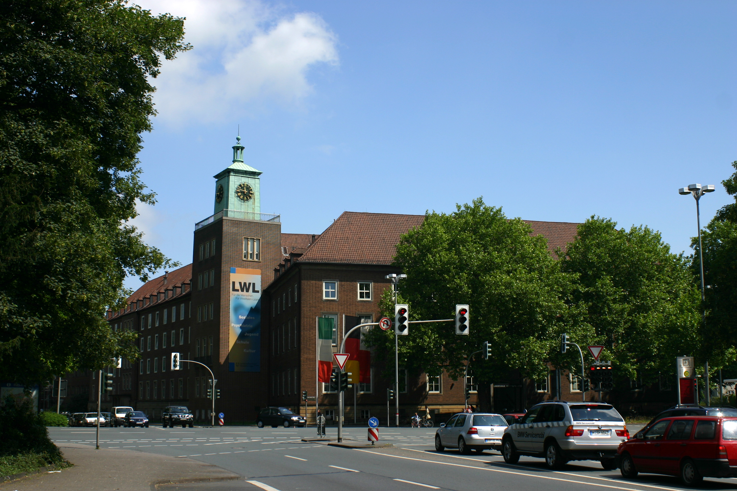 Landeshaus in Münster, Architekt Werner March, Sitz des Landschaftsverbandes Westfalen-Lippe